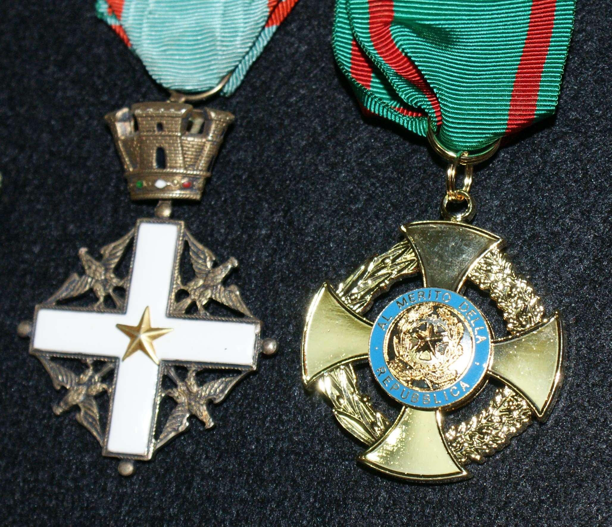 Le due versioni dell'Ordine al Merito della Repubblica Italiana a confronto. Sono il proprietario delle medaglie.